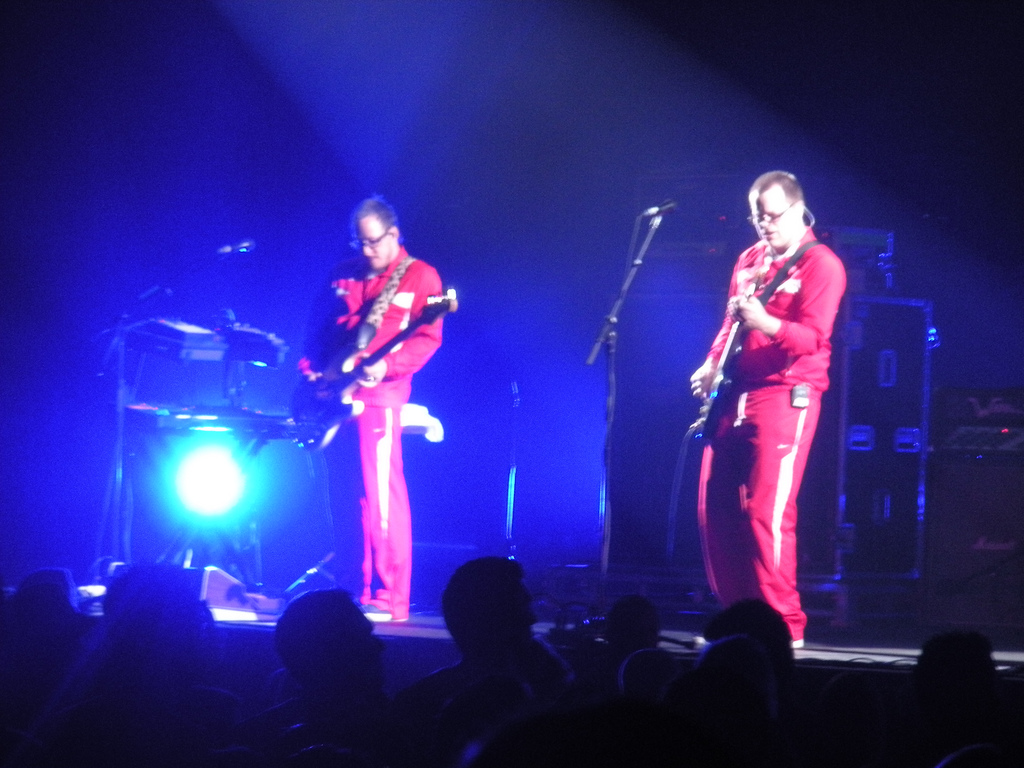 Weezer in Arizona